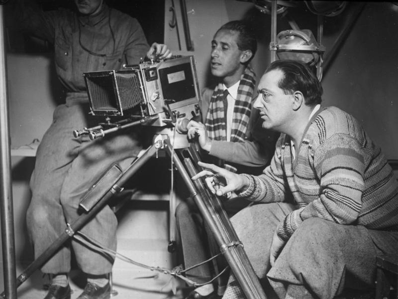 "Die Frau im Mond" Der bekannte Regisseur Fritz Lang bei den Aufnahmen des Weltraum-Films "Frau im Mond", dessen Uraufführung mit grosser Spannung entgegen gesehen wird.